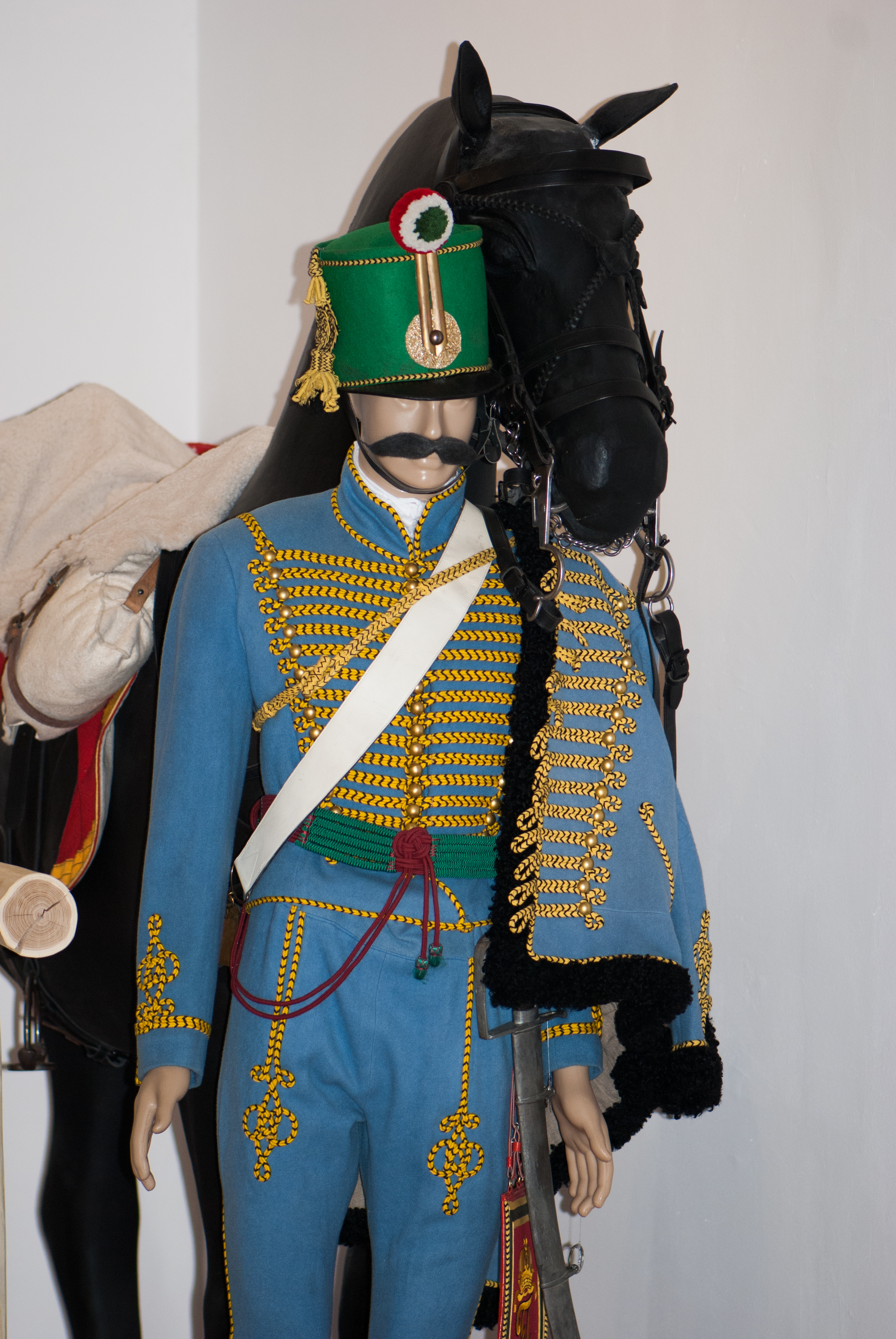 Budapest 2012